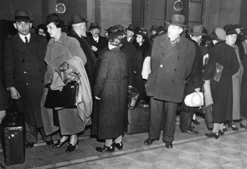 Ausweisung d. poln. Juden aus Nbg. Freitag d. 28. Okt. 1938 H. Großberger, Nürnberg Bildarchiv Franken